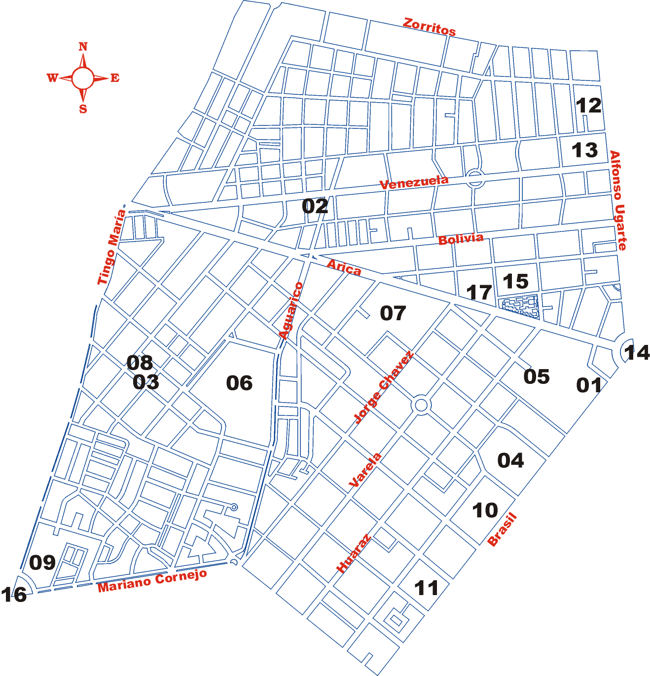 Distrito de Breña Este archivo a sido dibujado por Edgardo Reyes, quien como autor original, autoriza su libre uso dentro de la Enciclopedia Libre WIKIPEDIA. Edgardo Reyes 22:42 8 feb, 2005 (CET)